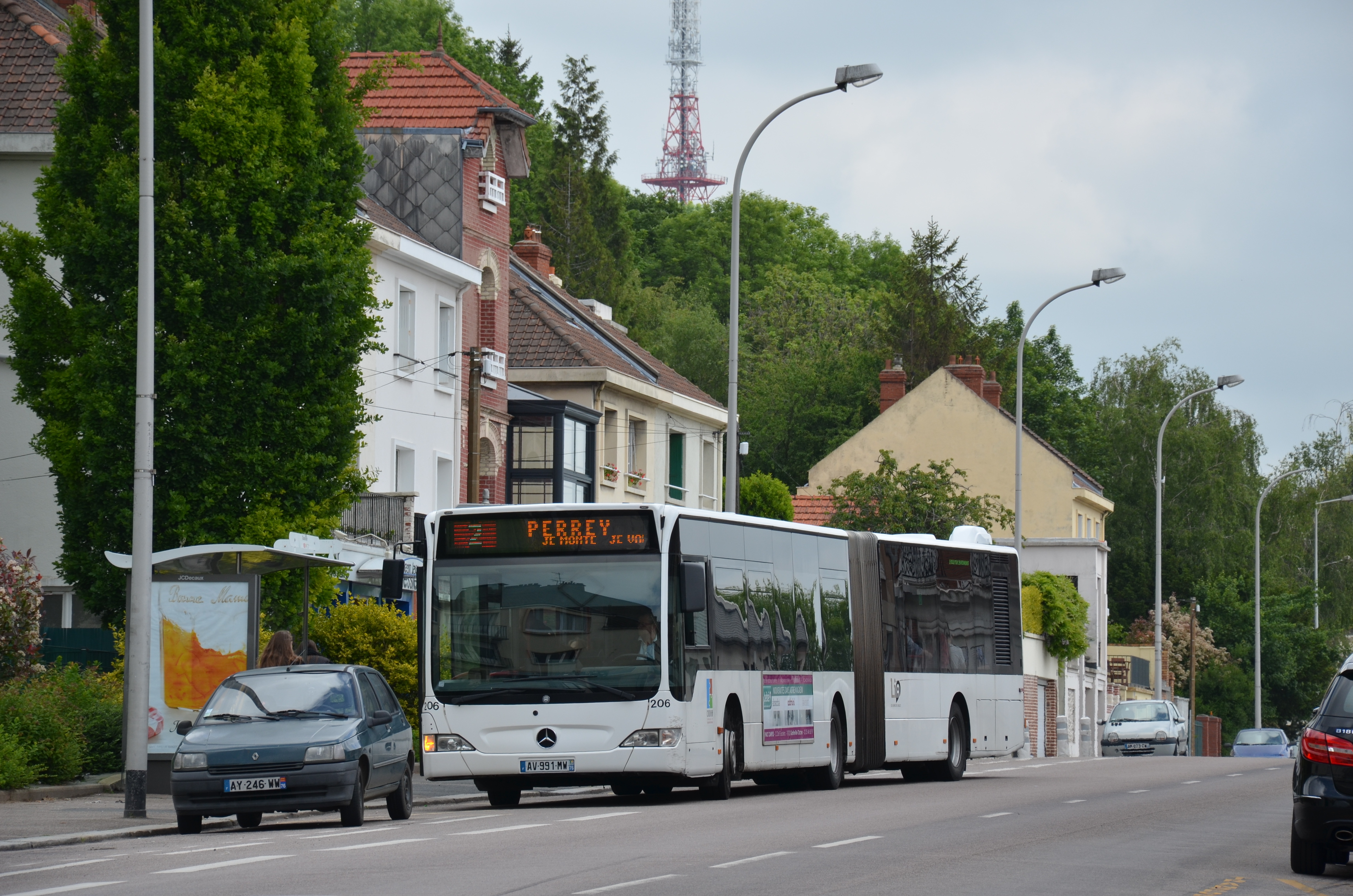 Mercedes Citaro G n°206 sur la ligne 2 du réseau LiA du Havre, à l'arrêt Graville.